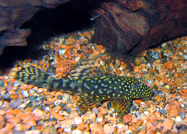 Bristlenose pleco, female (Ancistrus)